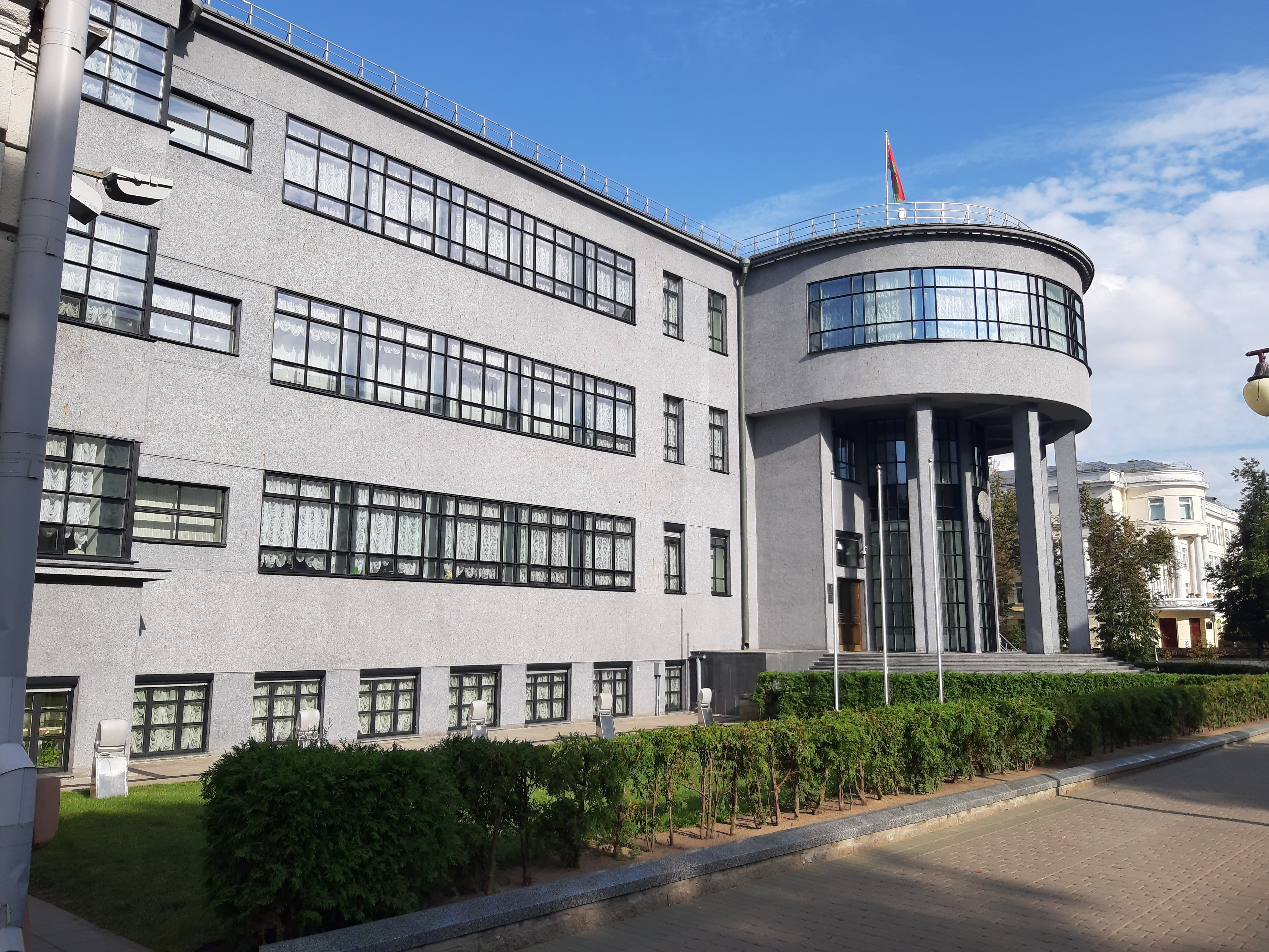 Мінск. Па Чырвонаармейскай